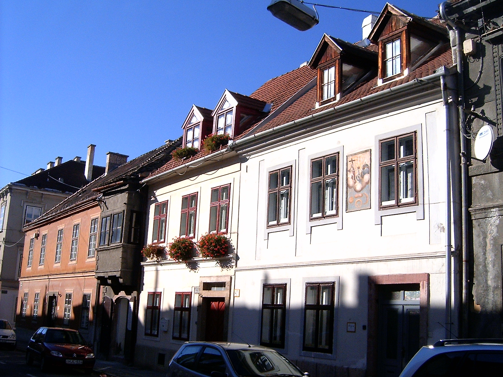 Részlet a győri Rákóczi utcából (Győr-Moson-Sopron megye)